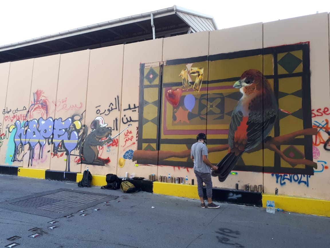 Proteste auf dem Beiruter Märtyrerplatz